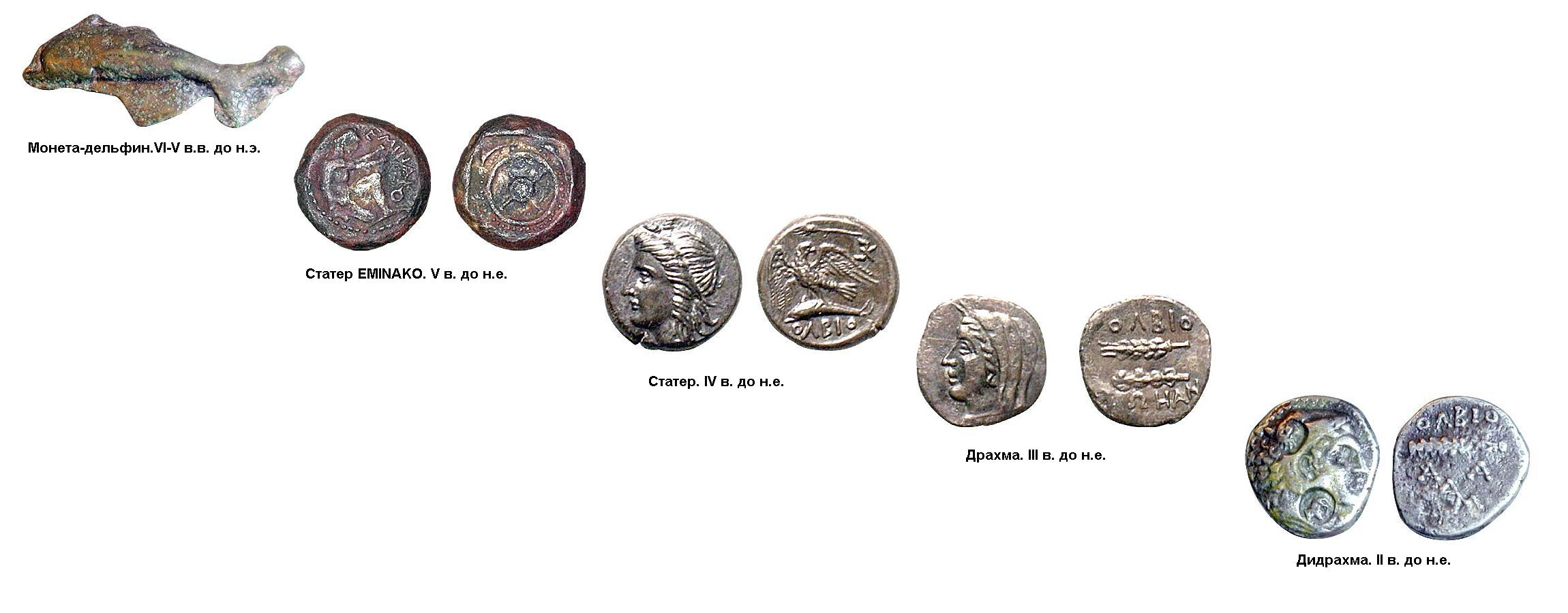 Изображение превращения монет Ольвии за определенный период